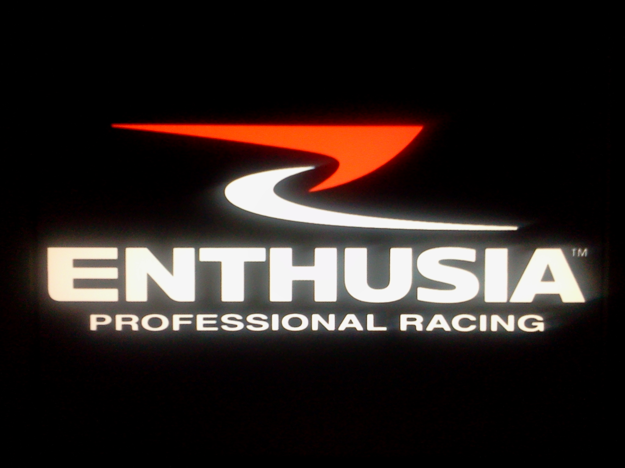 juego de carreras